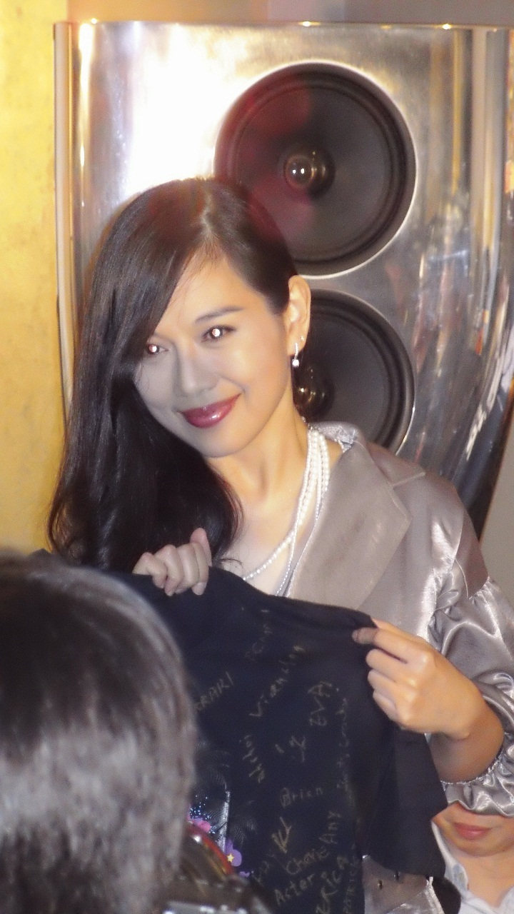 中文（香港）: 陳松伶的樣子